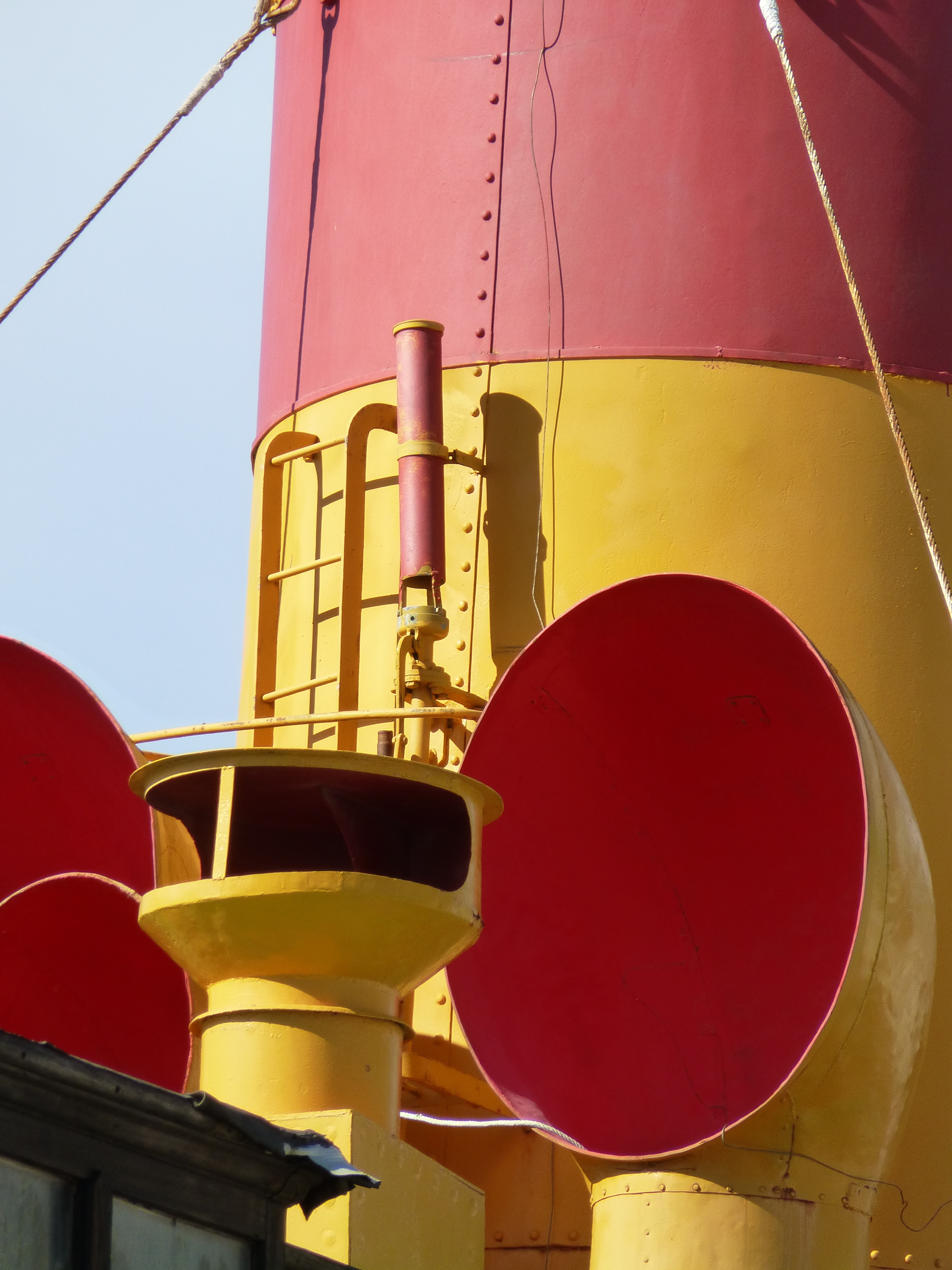 Detalle de la chimenea; silbato; tomas de aire o tubos de ventilación, del histórico vapor "La Palma", del año 1912, conservado en el puerto de Santa Cruz de Tenerife, Islas Canarias, España. Este buque de vapor era uno de los "correíllos" que comunicaban las diferentes islas.